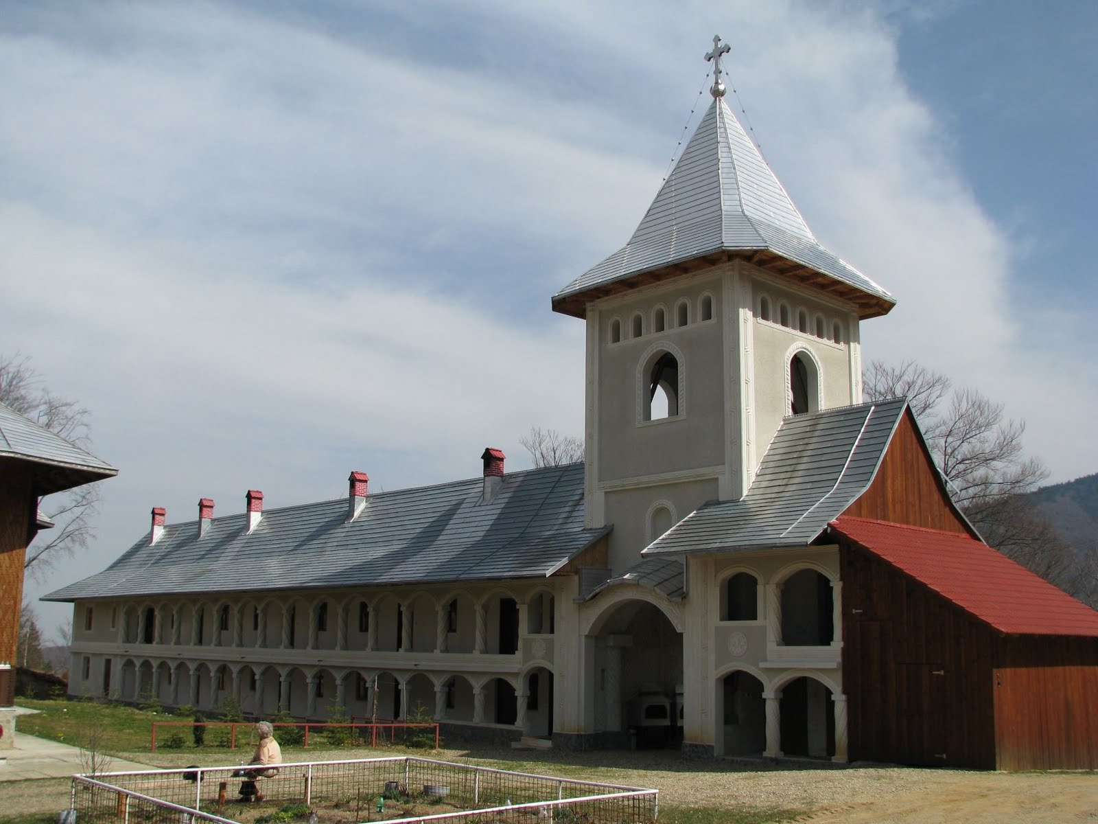 Mănăstirea Dejani, judeţul Braşov